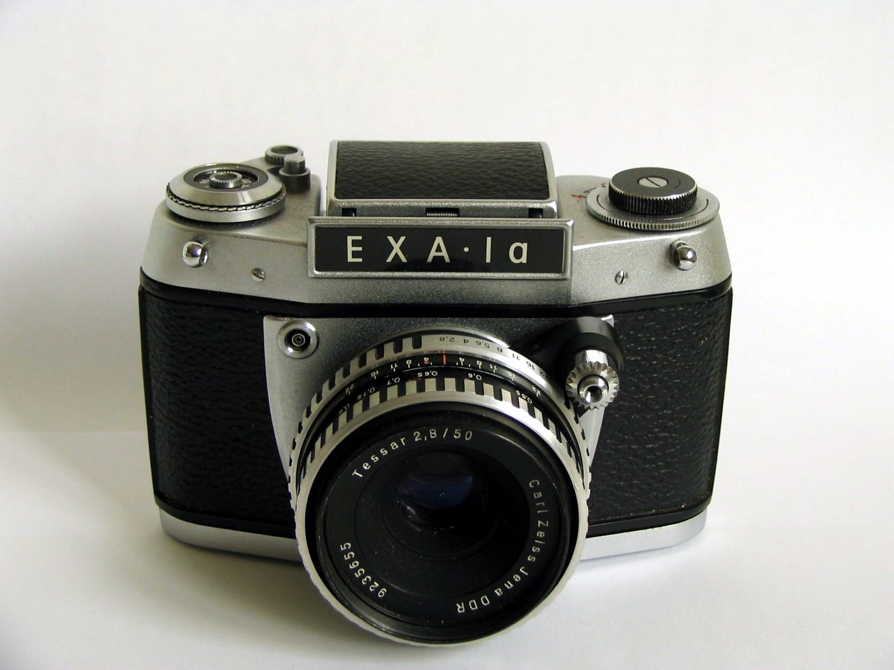 GDR: Exa 1a (SLR) - VEB Pentacon Dresden